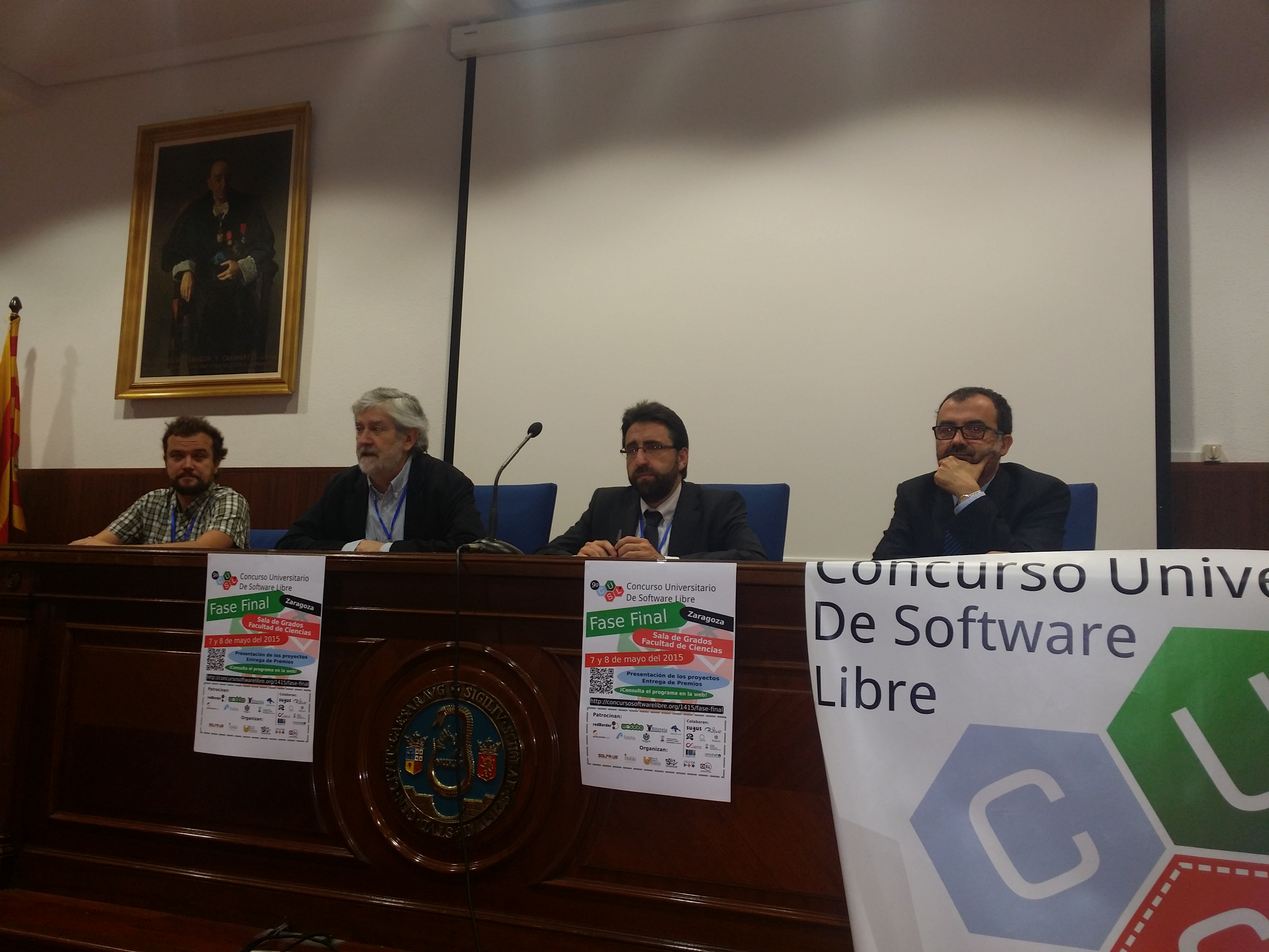 Presentación de la Fase Final del IX Concurso Universitario de Software Libre. De izqda. a dcha.: Pablo Neira Ayuso (profesor de la Universidad de Sevilla, responsable de netfilter y cofundador del CUSL), Fernando Zulaica Palacios (Vicerrector de Estudiantes y Empleo de la Universidad de Zaragoza), Luis Oriol Langa (Decano de la Facultad de Ciencias) y Enrique Teruel Doñate (Delegado del Rector para el SICUZ).